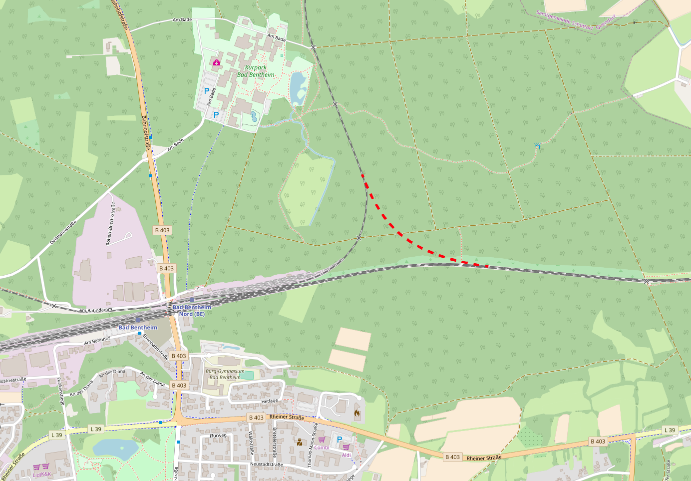 Skizze der geplanten Bentheimer Kurve in Bad Bentheim vom Schienennetz der Bentheimer Eisenbahn AG in das Netz der Deutschen Bahn in Richtung Rheine